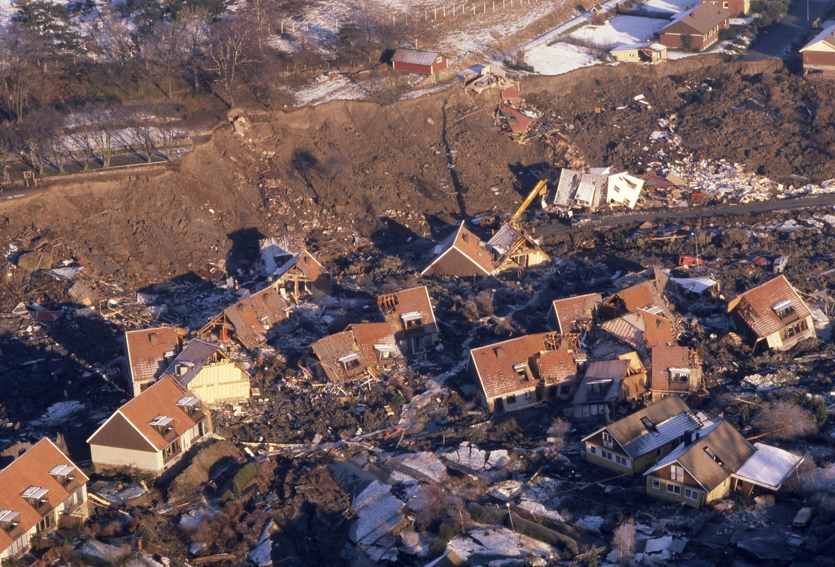 cylinderskred, rotationsskred, skålskred :: :: Ingår i serie med fotonr. 7033:1-168 med bilder från Tuveskredet.